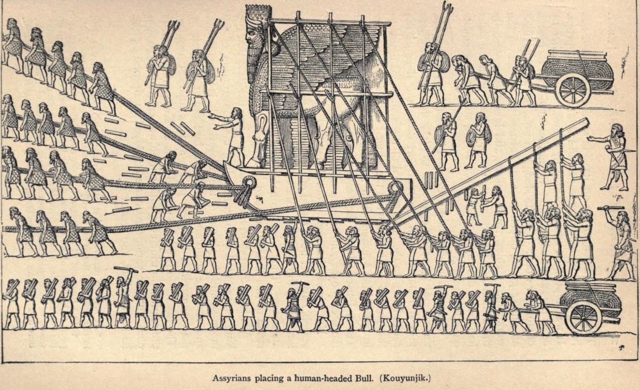 Assyrer ziehen einen menschenköpfigen Stier auf einem Schlitten in seine endgültige Position - Relief aus Kujundschik (Ninive)